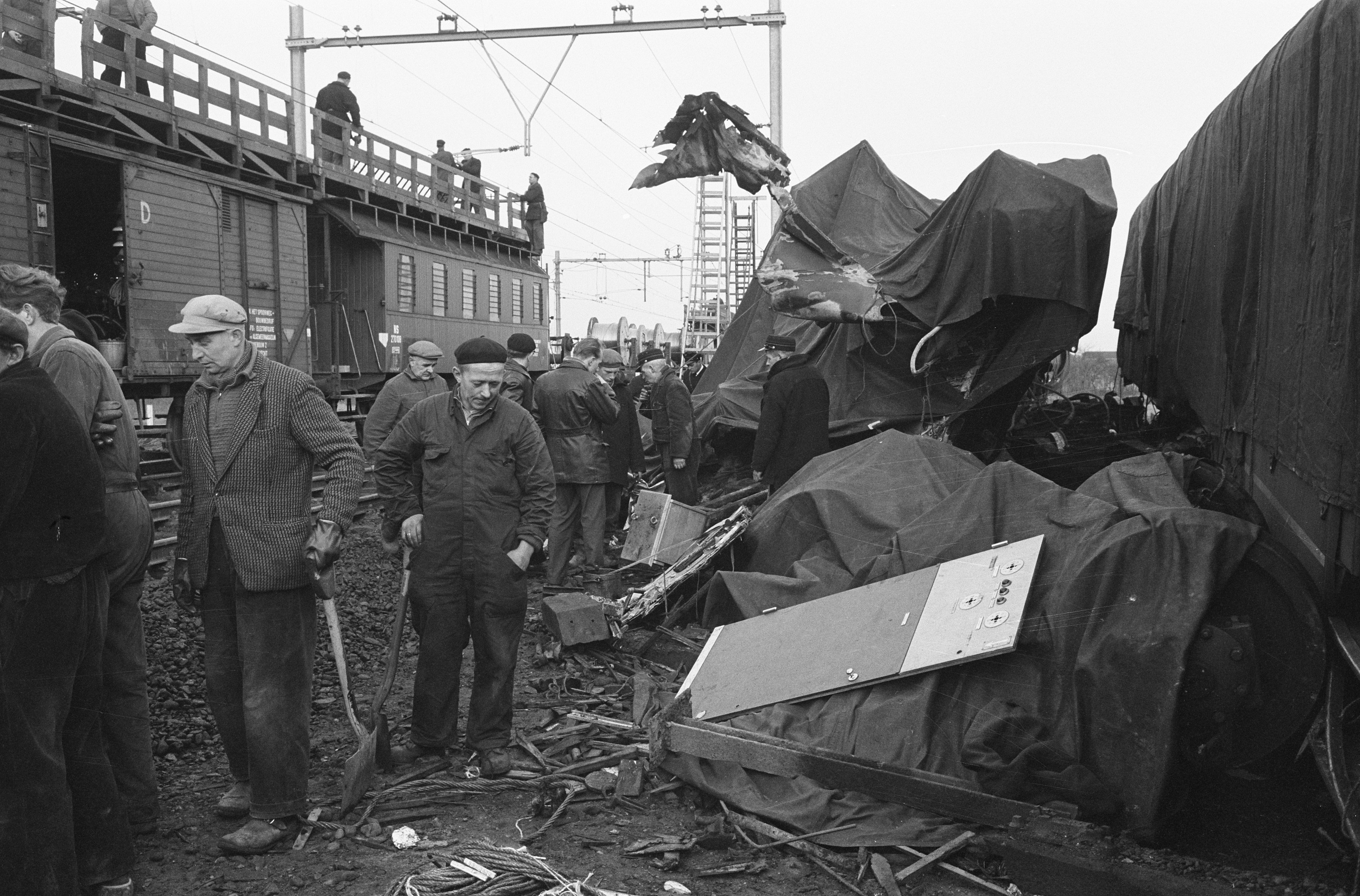 Collectie / Archief : Fotocollectie Anefo Reportage / Serie : [ onbekend ] Beschrijving : Opruimen van treinravage bij Woerden Datum : 9 januari 1962 Locatie : Utrecht, Woerden Fotograaf : Pot, Harry / Anefo Auteursrechthebbende : Nationaal Archief Materiaalsoort : Negatief (zwart/wit) Nummer archiefinventaris : bekijk toegang 2.24.01.05 Bestanddeelnummer : 913-3830